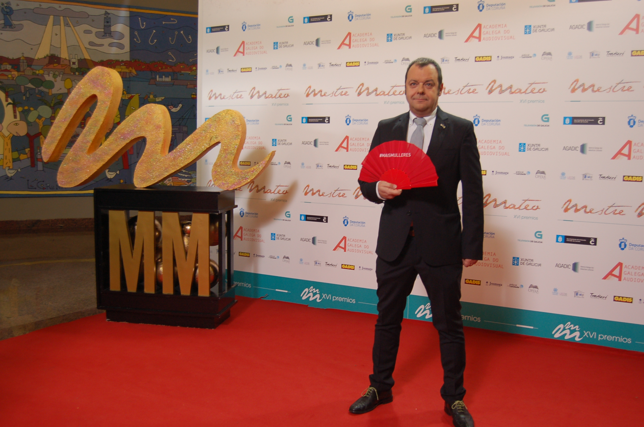 Premio Mestre Mateo 2017 phtocall